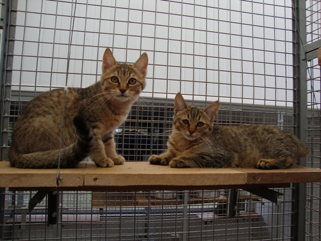 Disponíveis